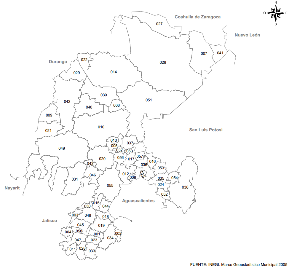 División municipal del Estado de Zacatecas.